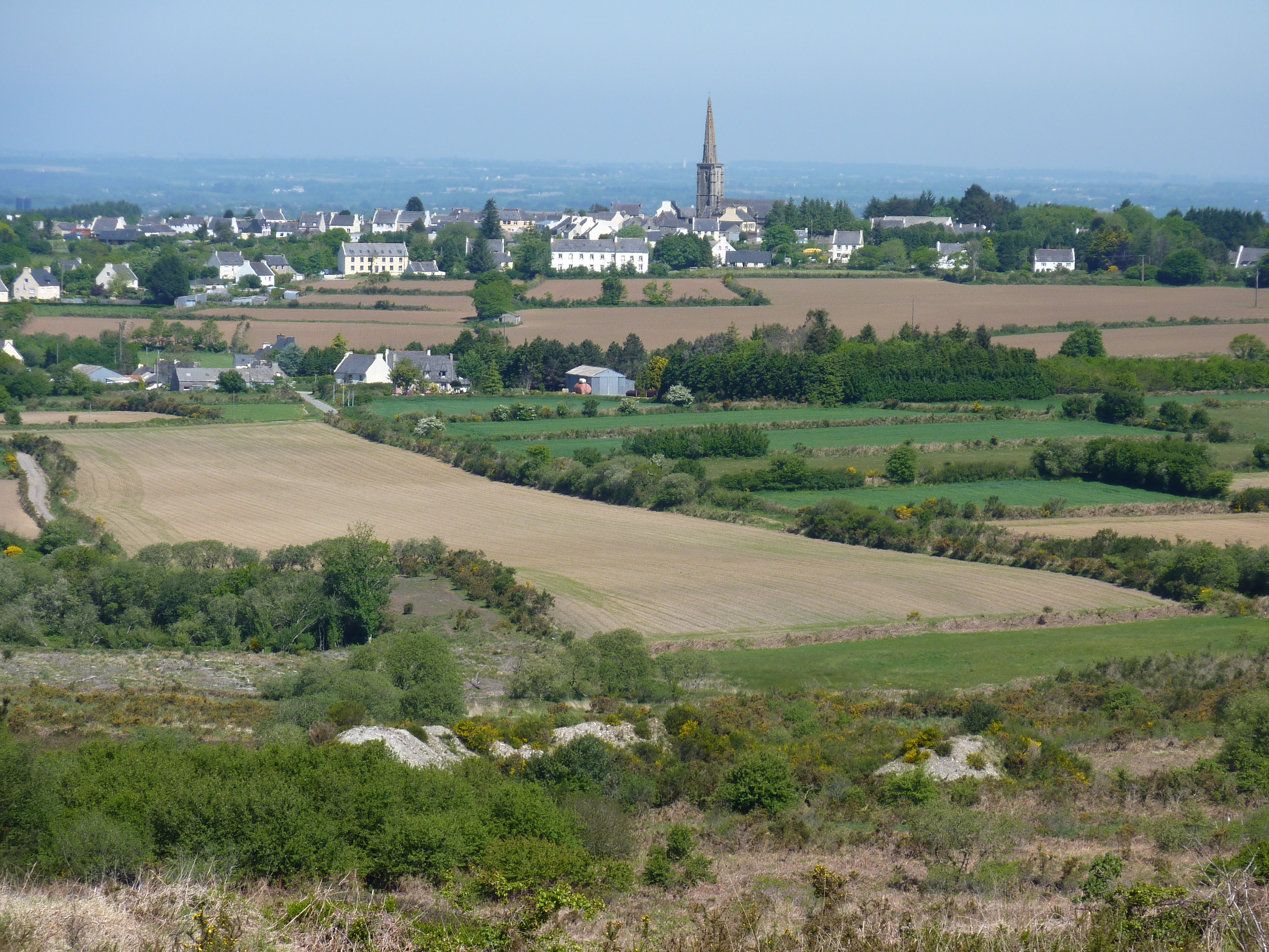 Vue générale de Commana sur sa colline depuis les crêtes de l'Arrée